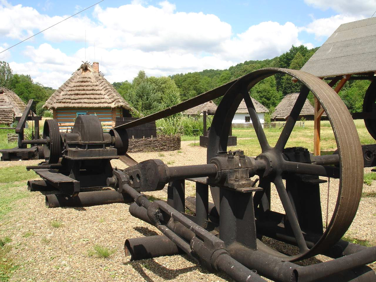 Sanok, osada naftowa, urządzenia naftowe